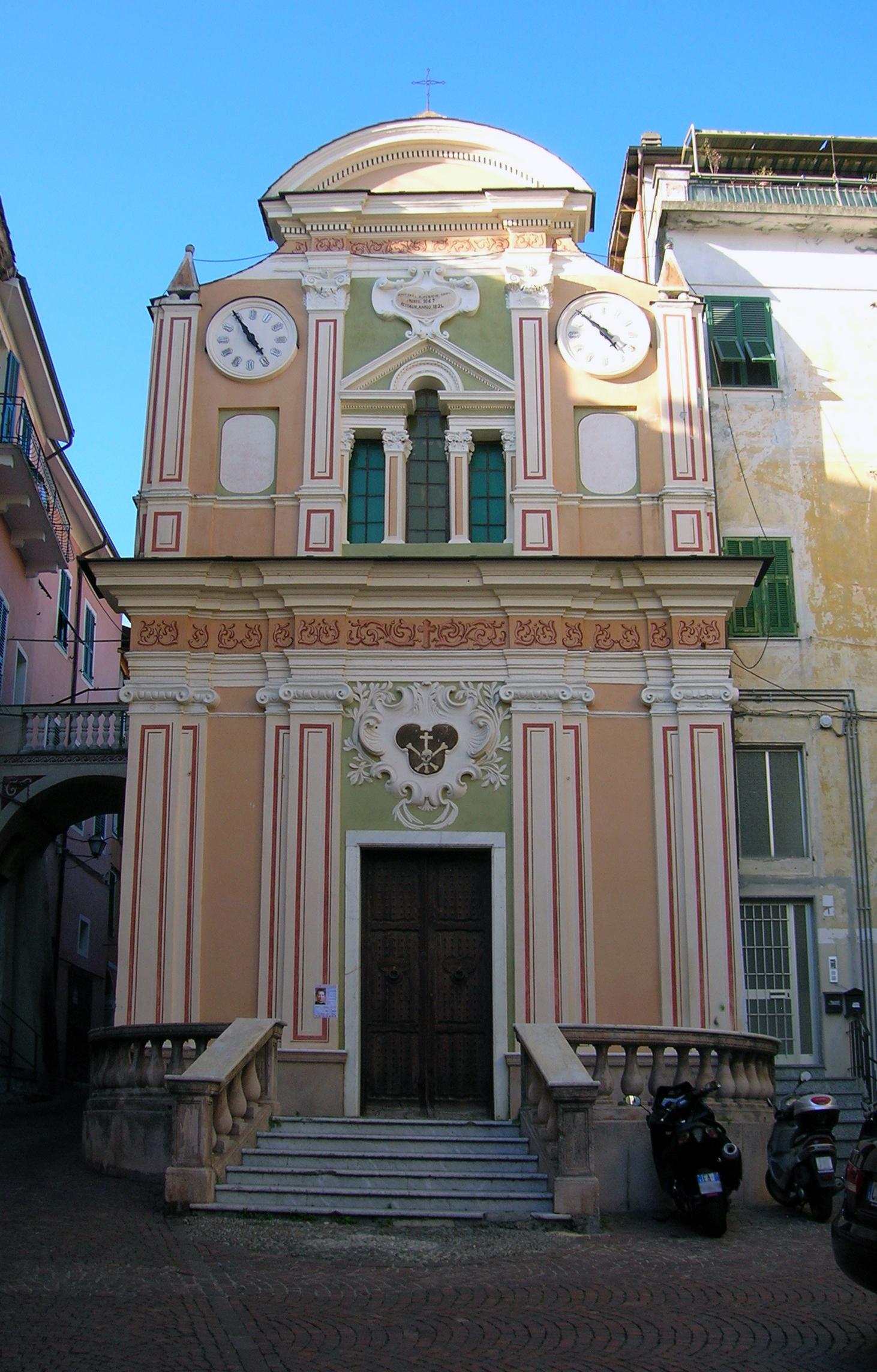 facciata Oratorio del Suffragio o dei Neri, Camporosso, Liguria, Italia.